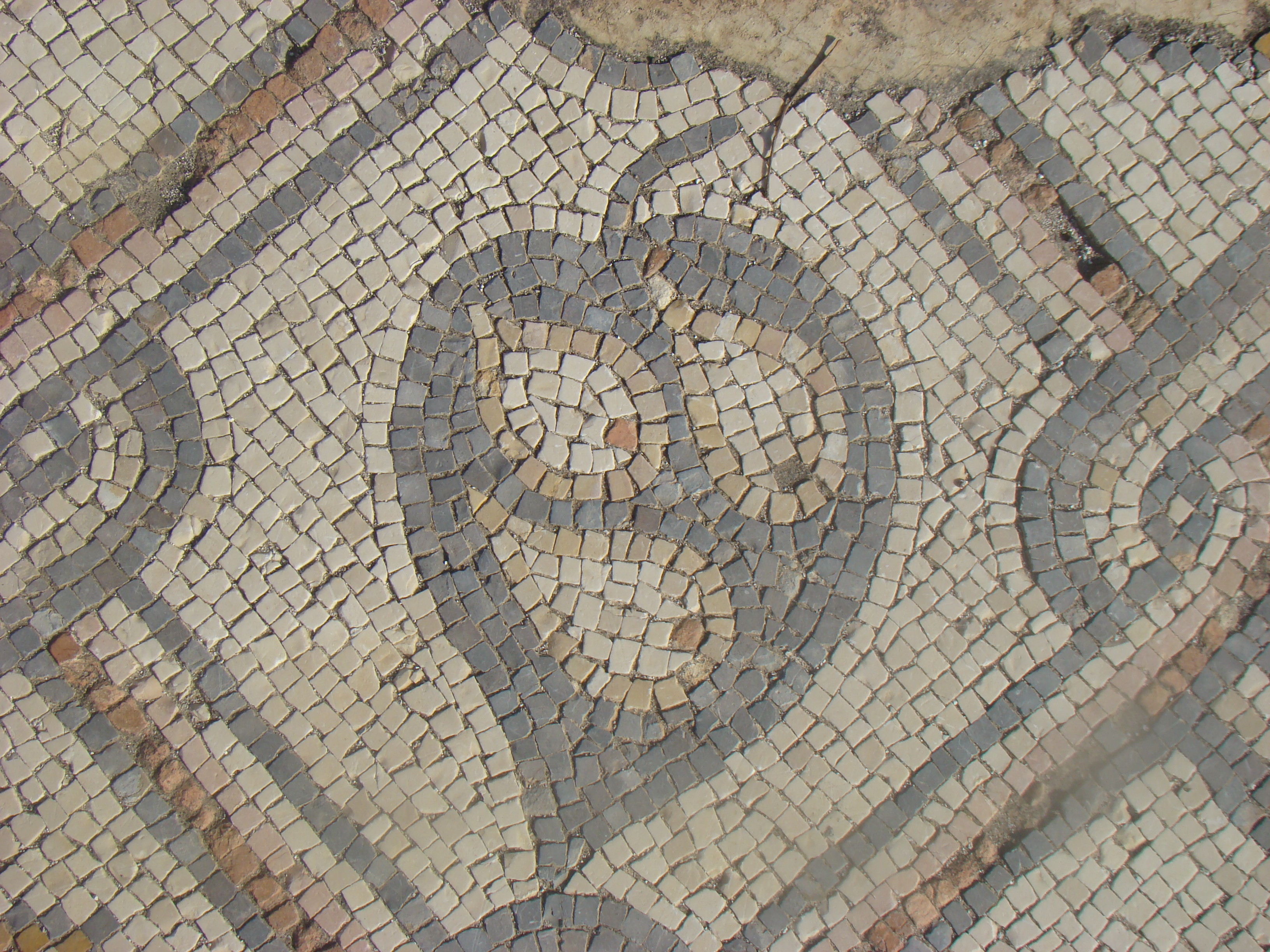 פסיפס כנסיית כורסי, מוטיבים מפסיפס הסטרה הצפונית